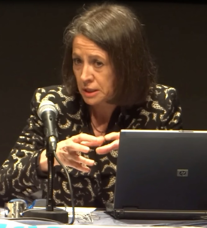 Ofelia Rey Castelao en una conferencia en 2015.